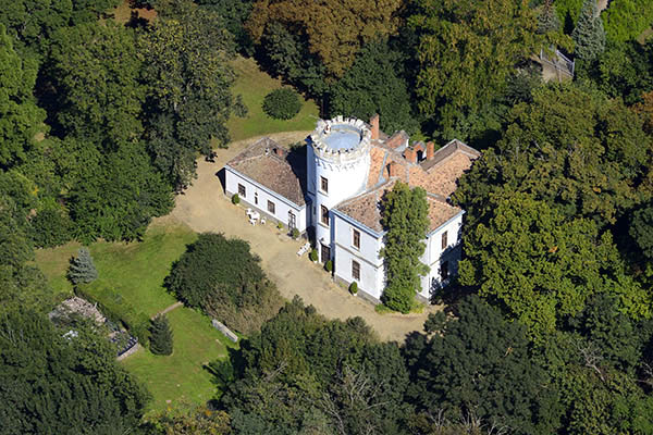 Meggyeskovácsi, Bejczy-kastély